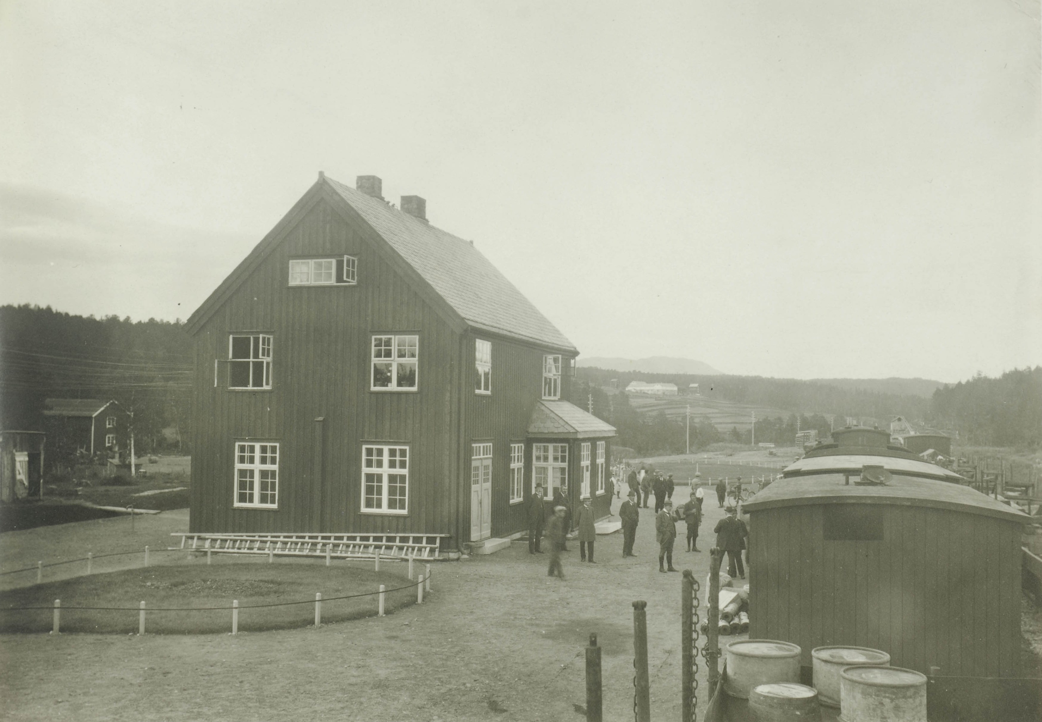 Garli stasjon på Dovrebanen, trolig i 1920- eller 1930-årene